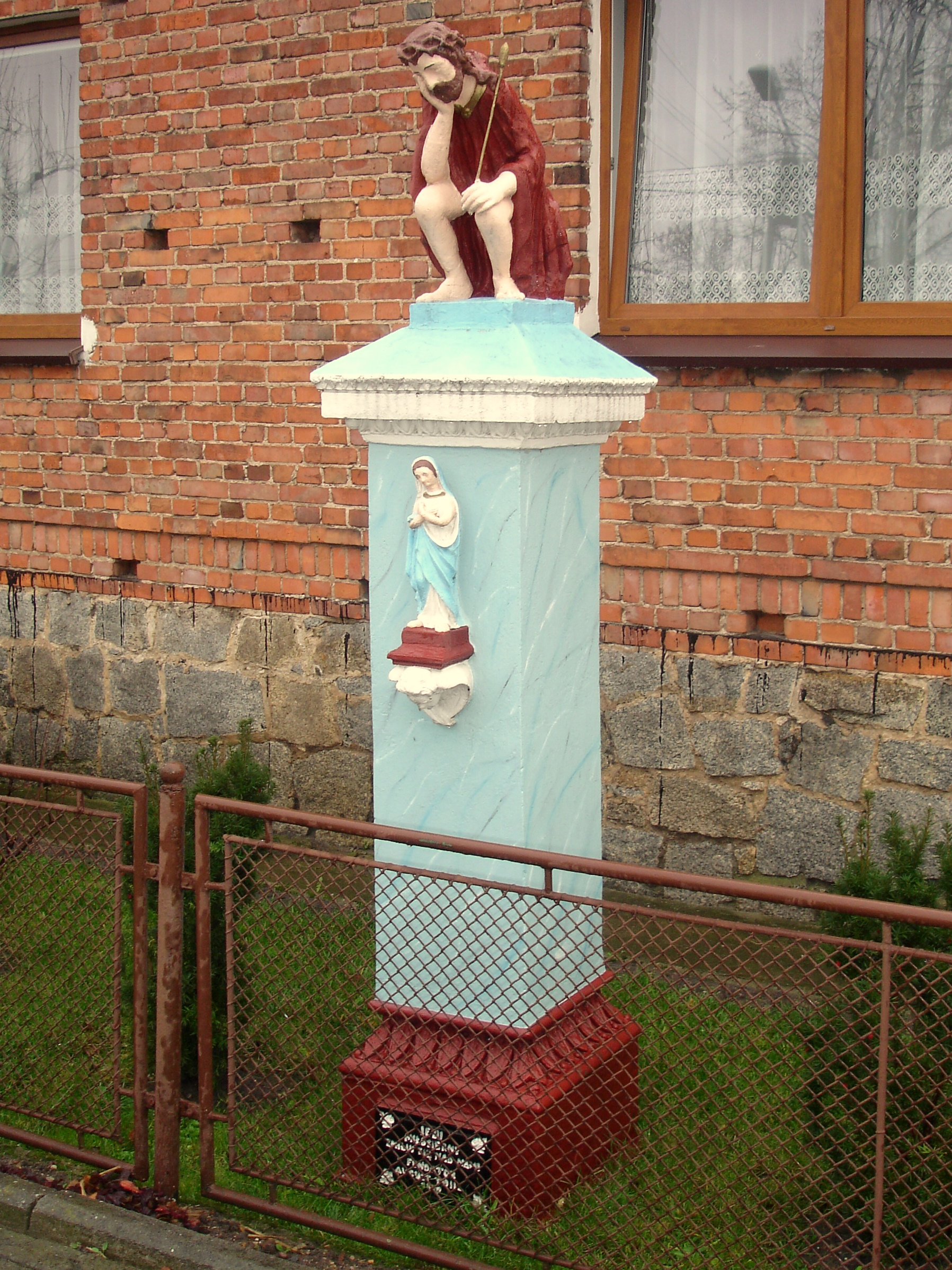 Figura Chrystusa Frasobliwego w Pawłowicach